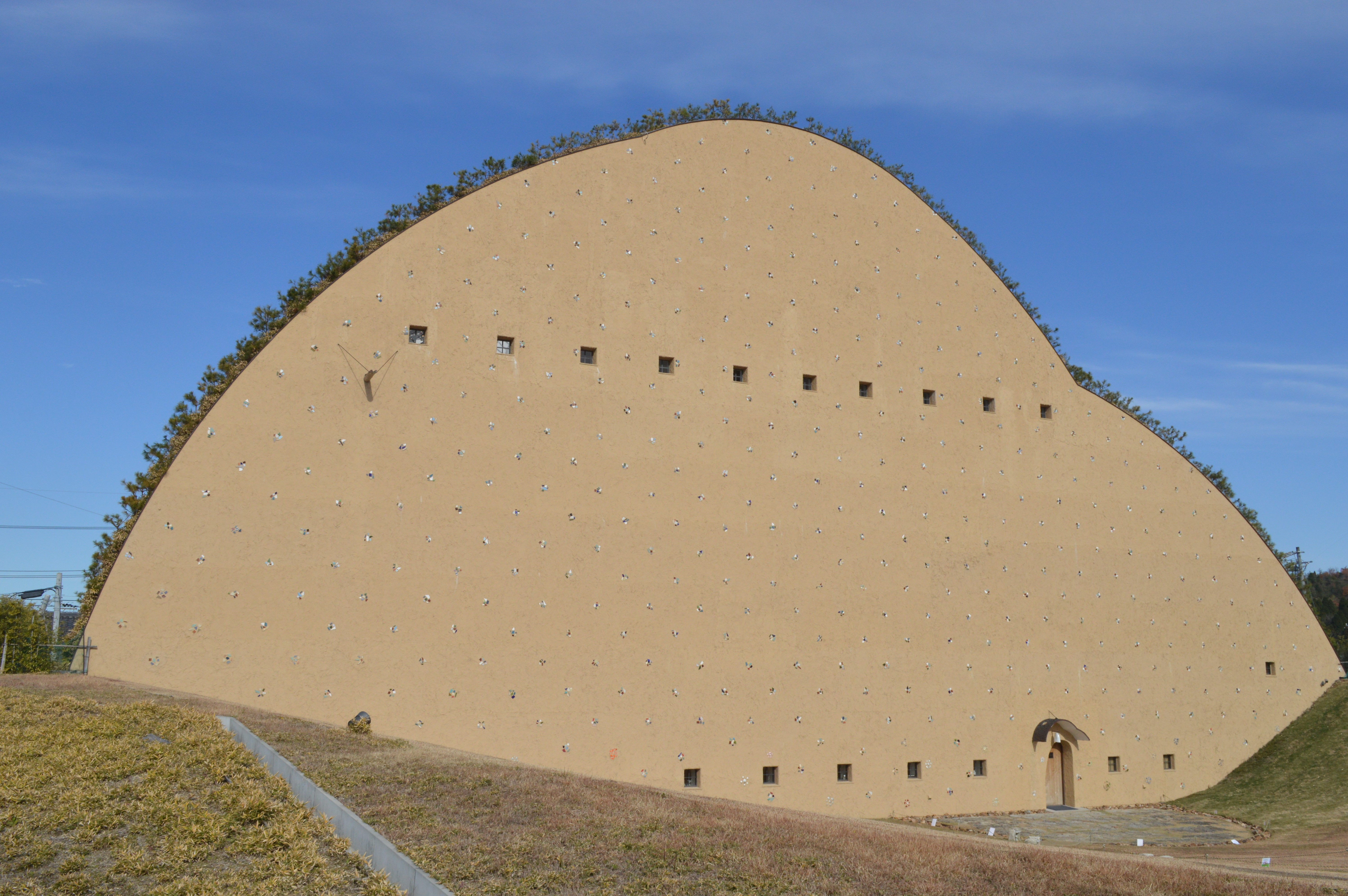 岐阜県多治見市の多治見市モザイクタイルミュージアム。